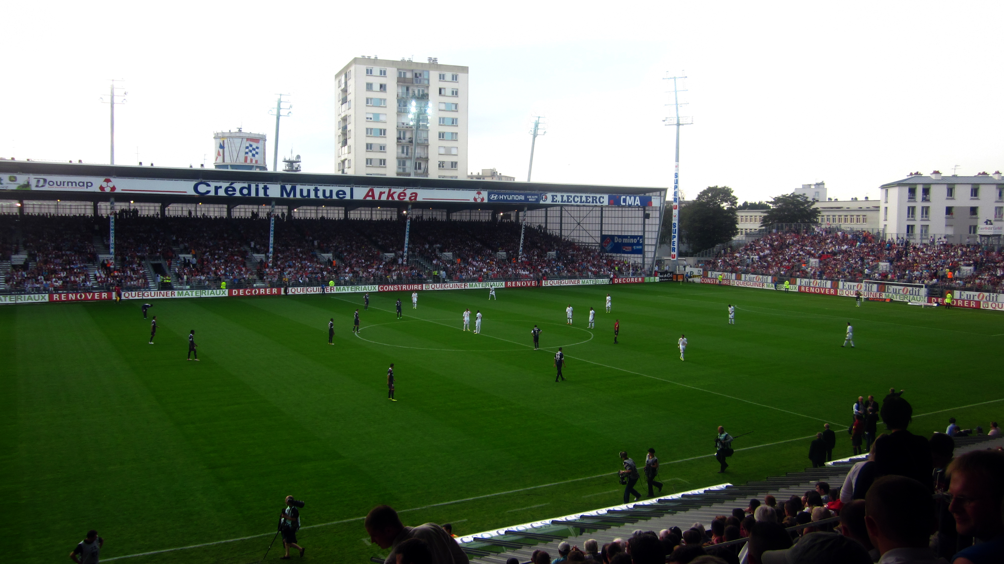 La pelouse du stade Francis-Le Blé à Brest, vue de la tribune Foucauld, lors du coup d'envoi de Brest-Lyon le 20 août 2011.